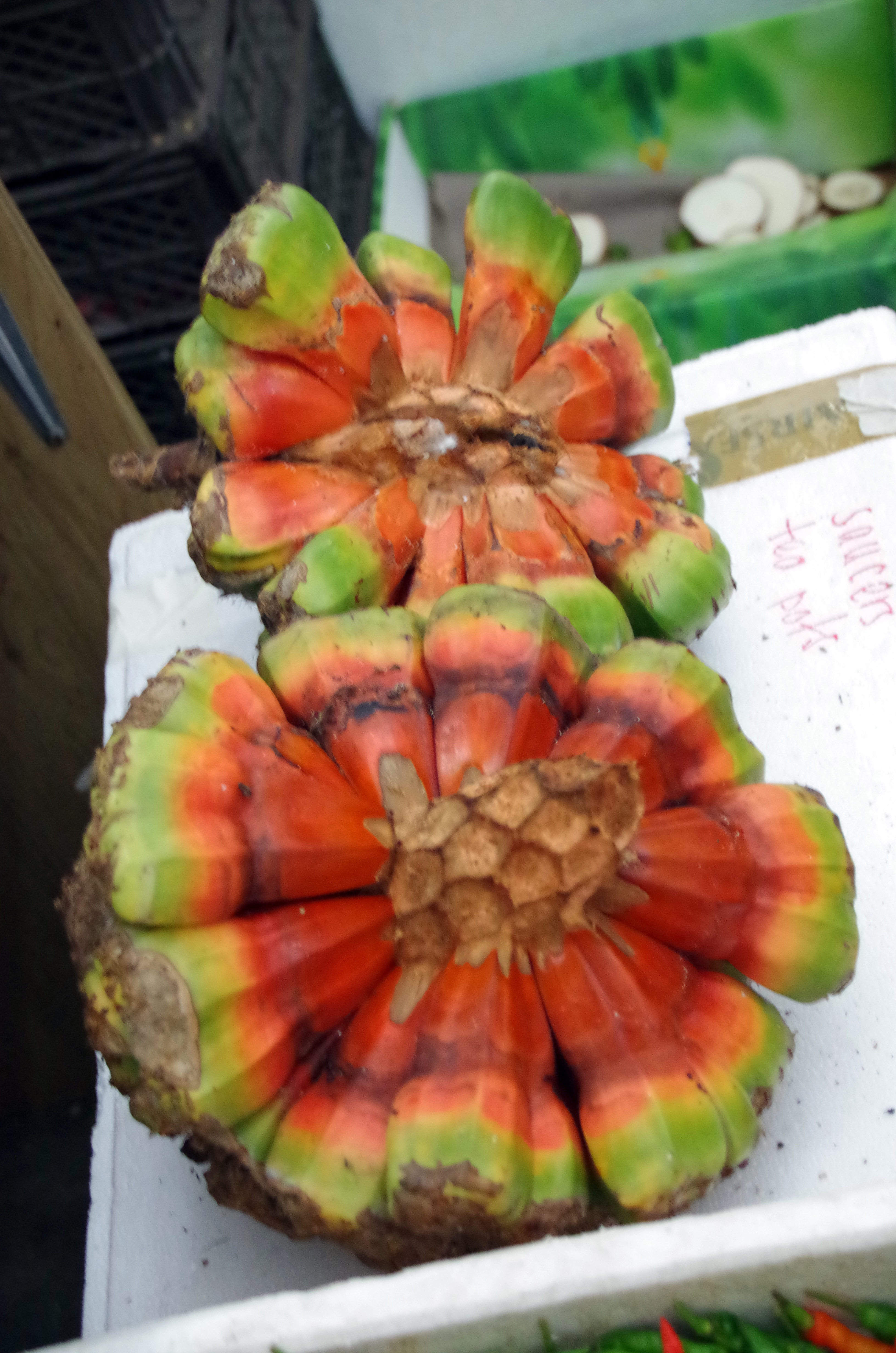 Pandanus-Frucht im Markt von Malé